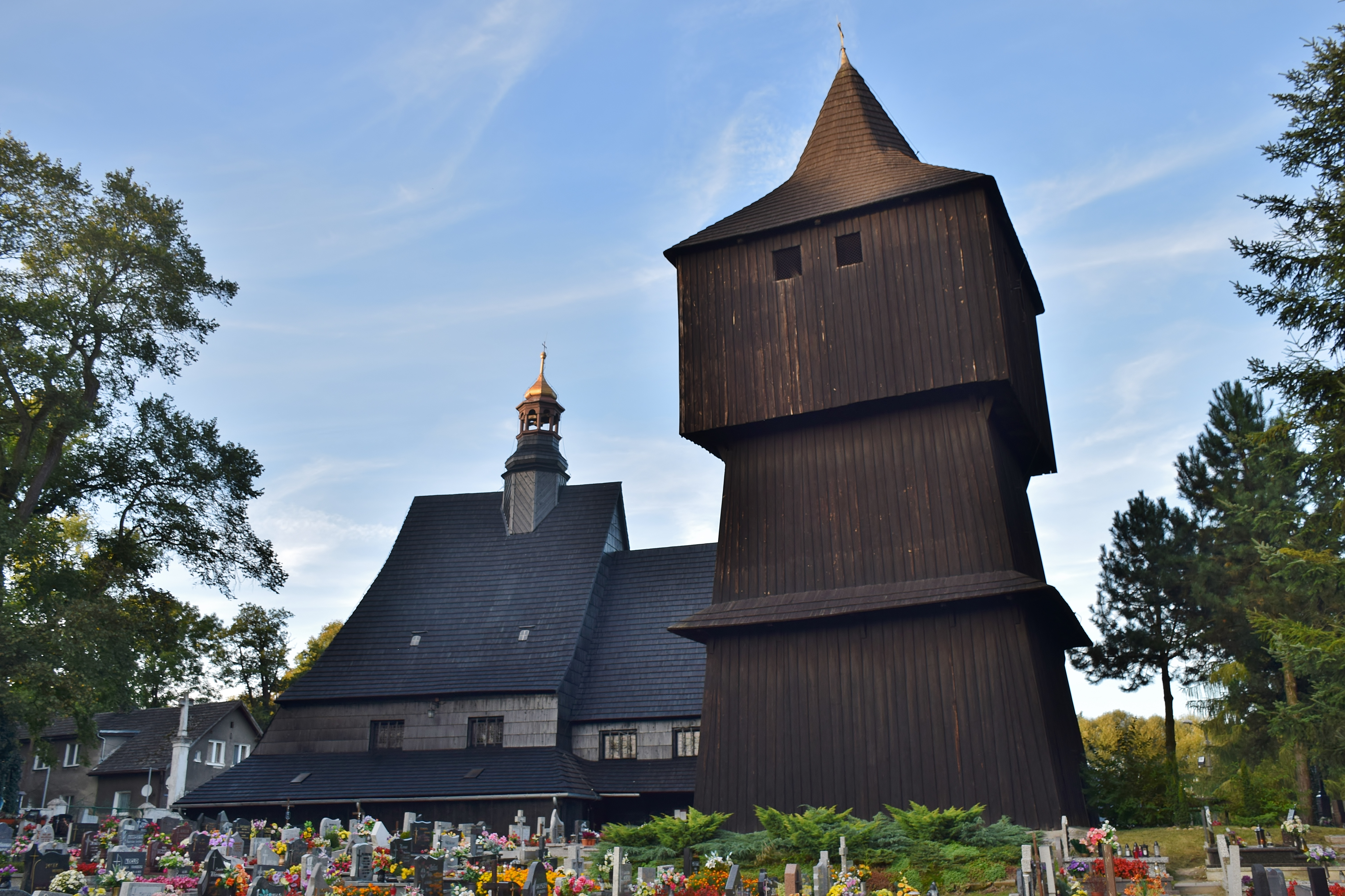 Poniszowice, dzwonnica, 1520